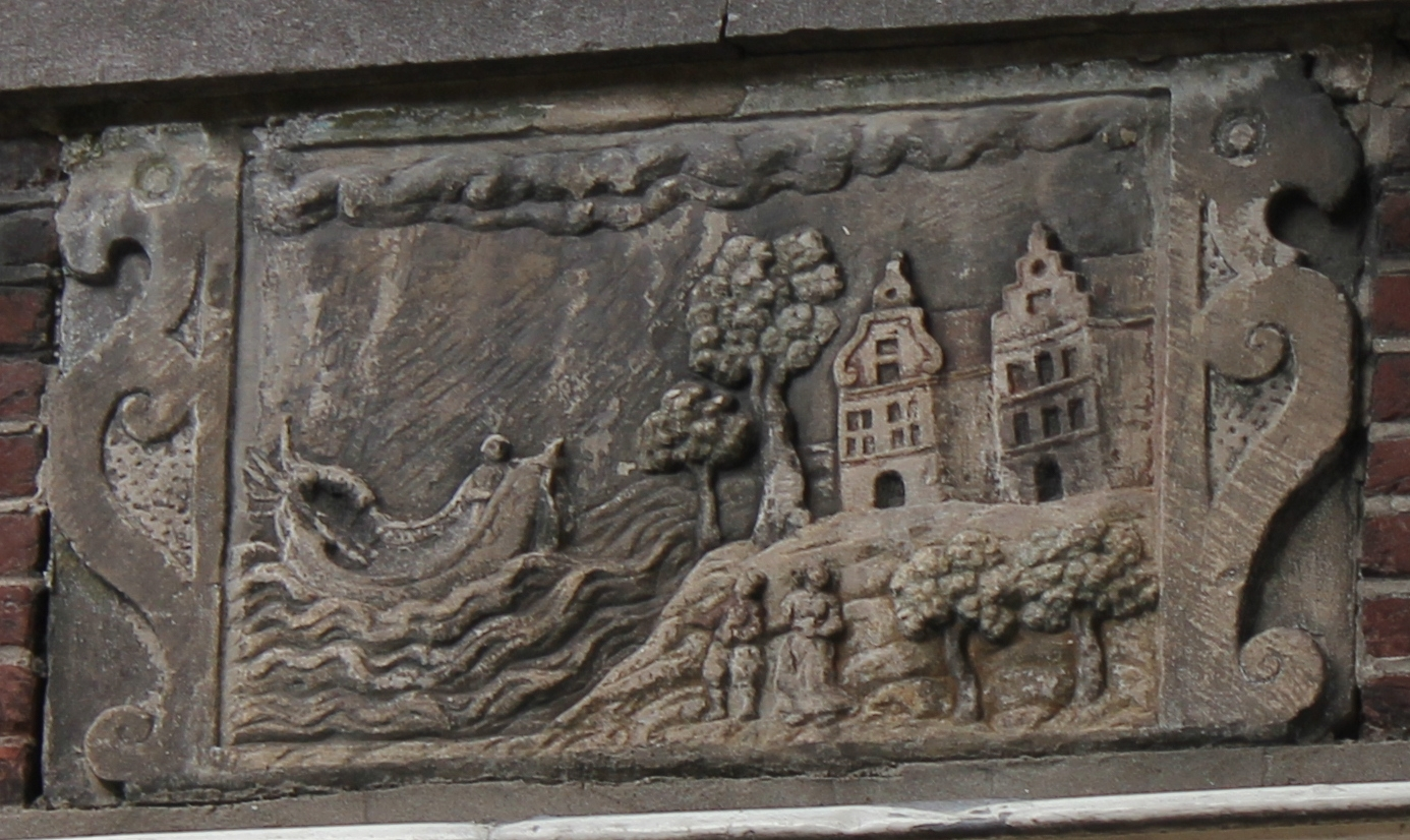 Gevelsteen Neude 1 met Kintgenshaven te Utrecht. De gevelsteen beeldt het verhaal rond Beatrix de Rijke uit.